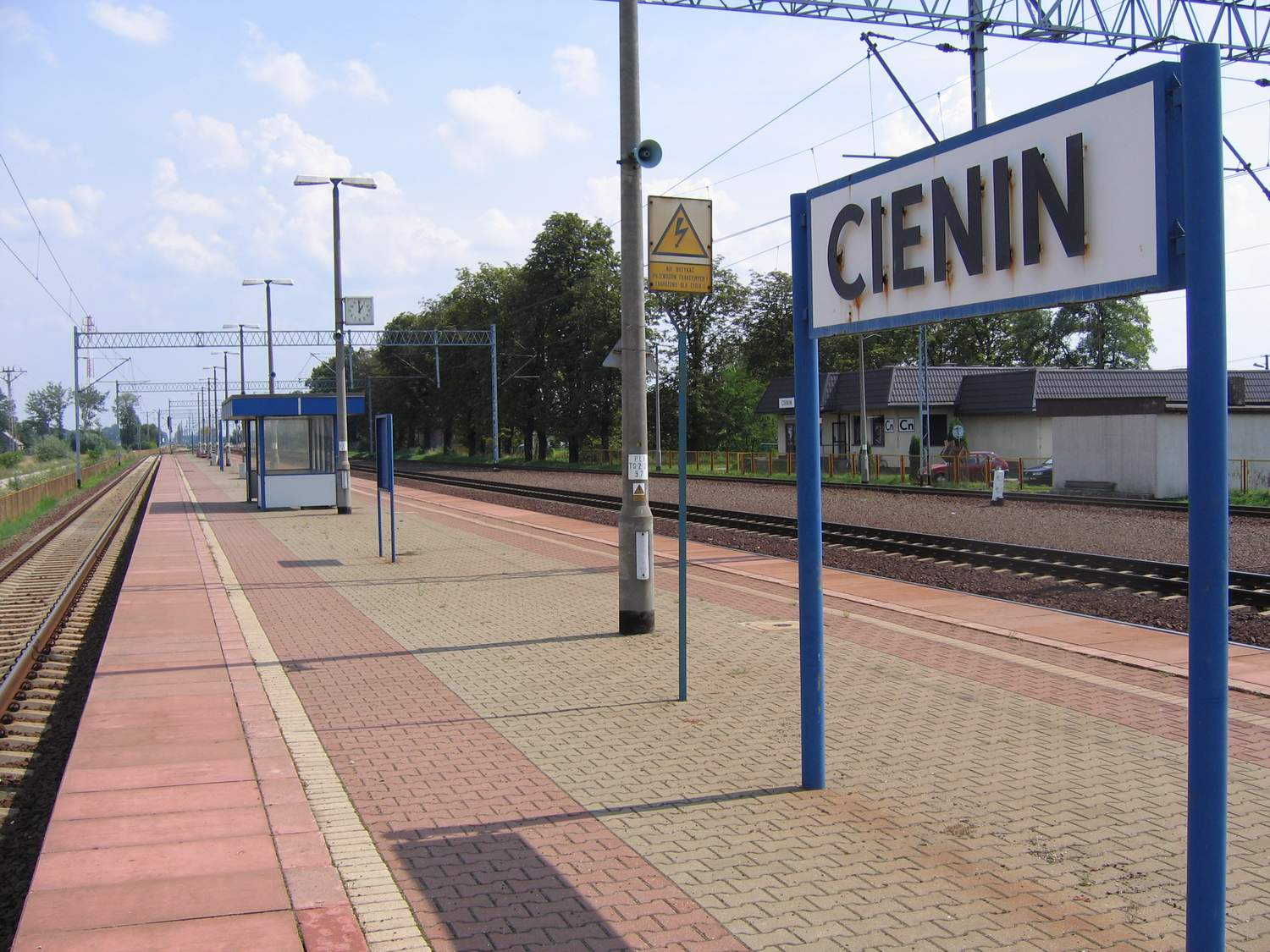 Cienin - stacja kolejowa połozona w Cieninie Zabornym, wsi Gminy Słupca i powiatu słupcekiego, sierpien 2007 (foto.M.Majdecki)